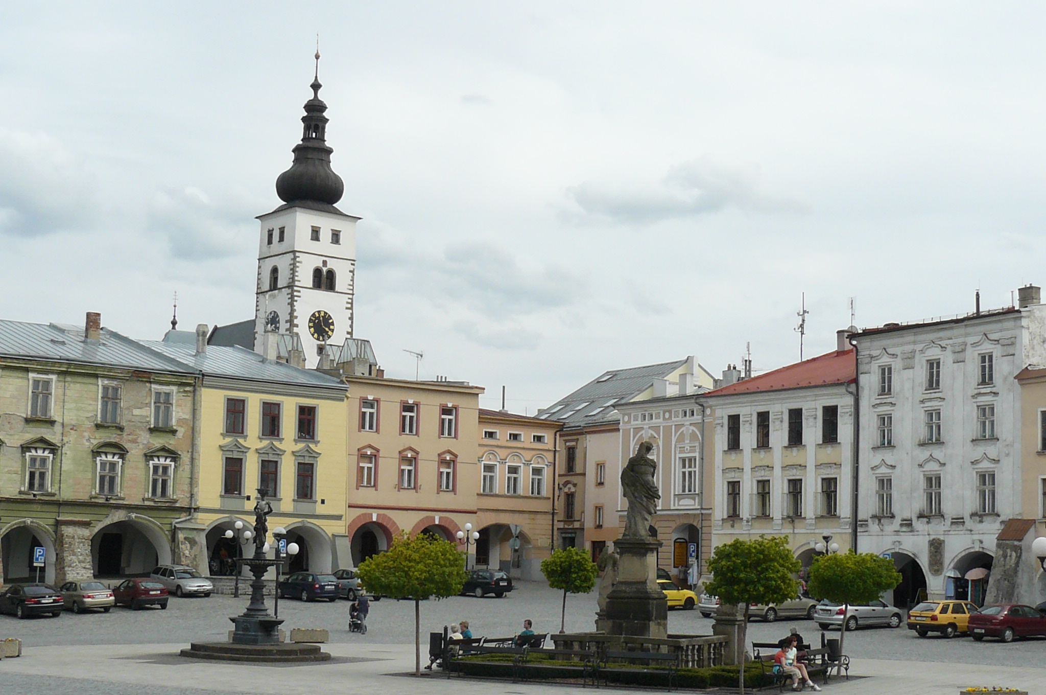 Příbor, rynek.